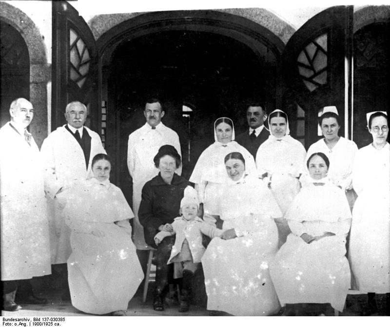 China, Prov. Chihli, Peking, Ärzte und Pflegepersonal des Deutschen Hospitals